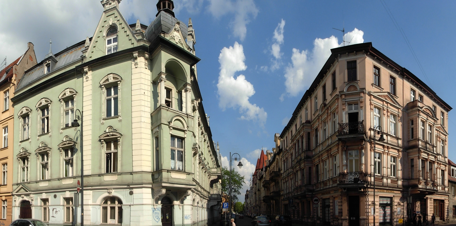 Ulica Augusta Cieszkowskiego w Bydgoszczy - widok od ul. Pomorskiej